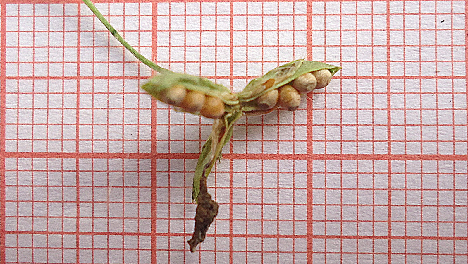 Hybanthus heterosepalus (Eichler) Hassl.